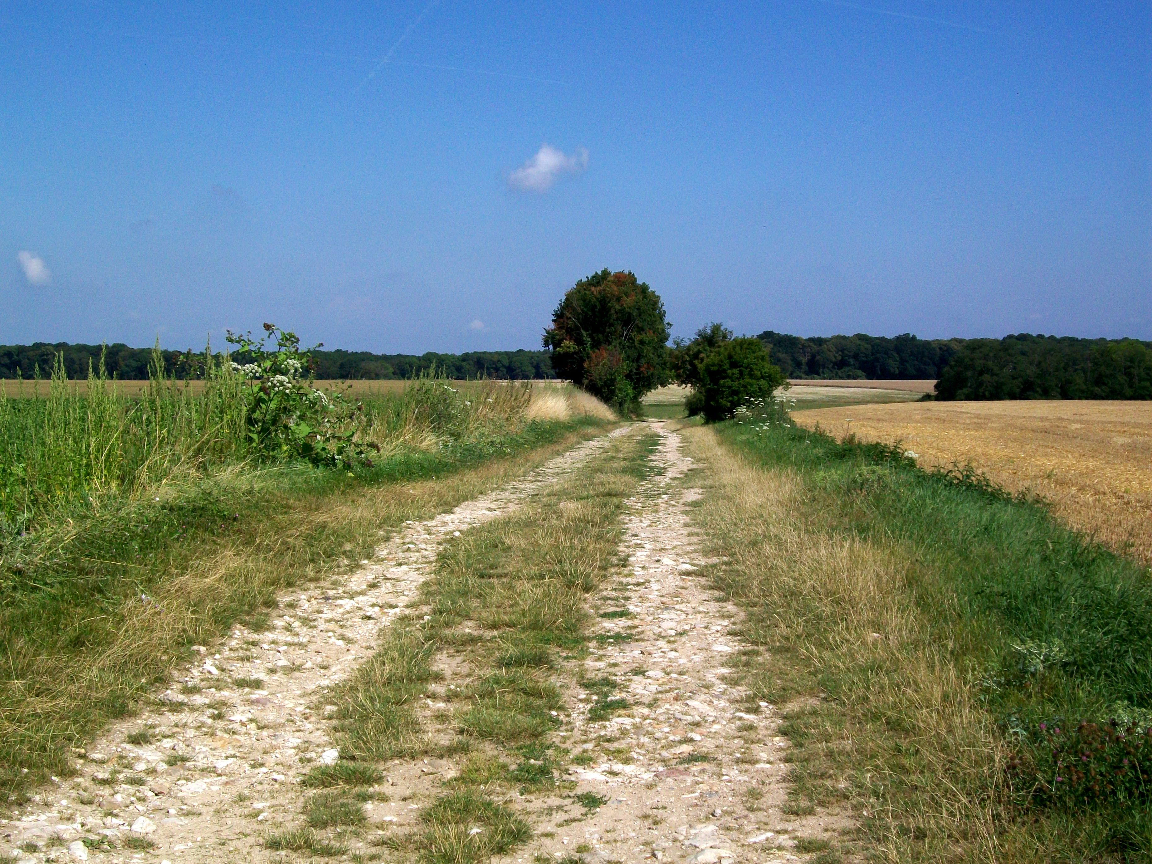 Le chemin rural n° 17 dit voirie de la Tournelle, qui mène du bourg vers le bois de Morrière et la Pierre Monconseil.